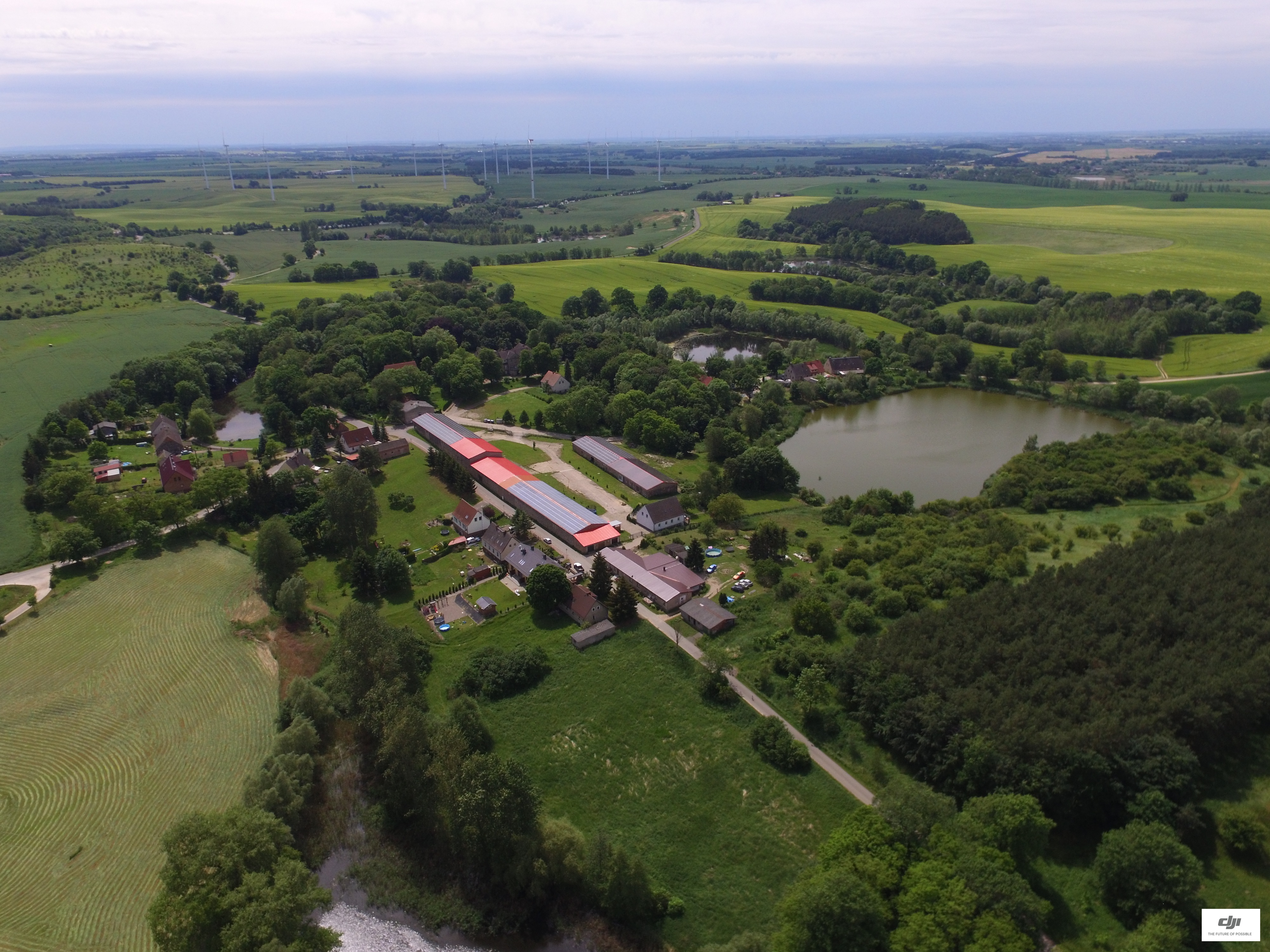 Übersicht über Pomellen